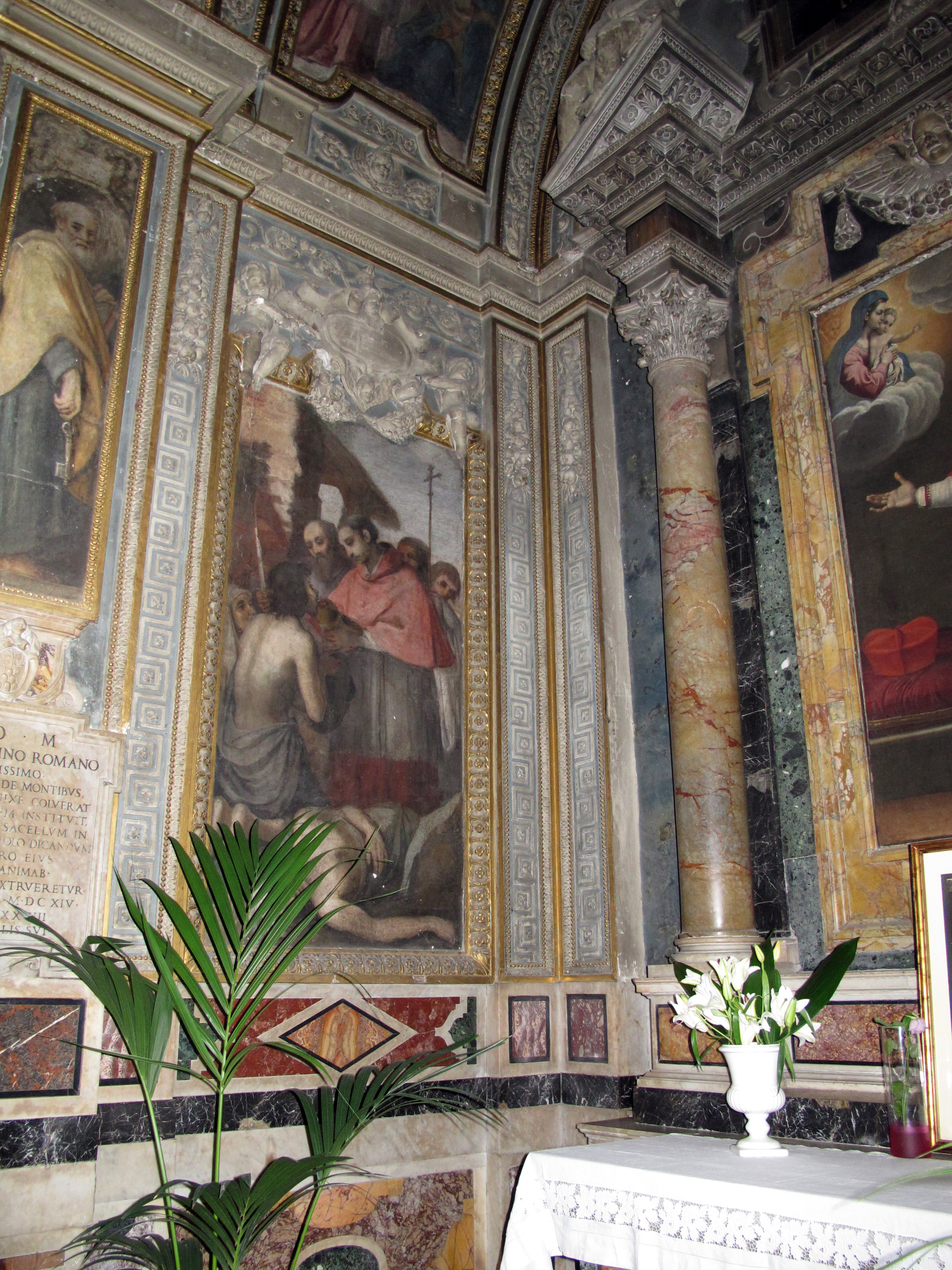 Roma, vedi titoli